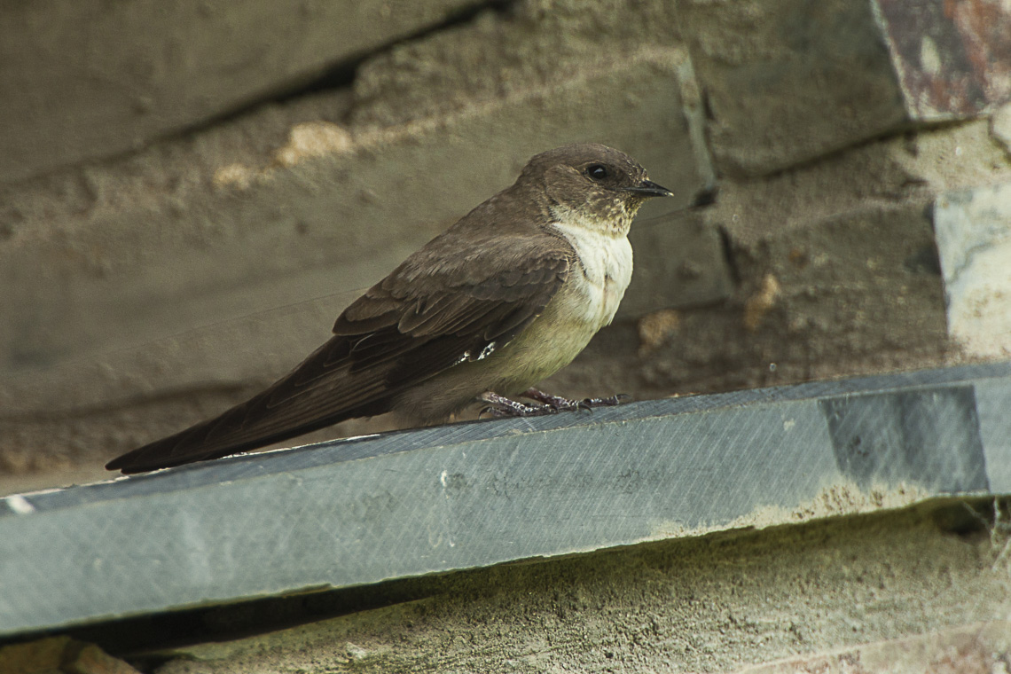 Eurasian Crag Martin Ptyonoprogne rupestris, Extremadura, Spain 1779